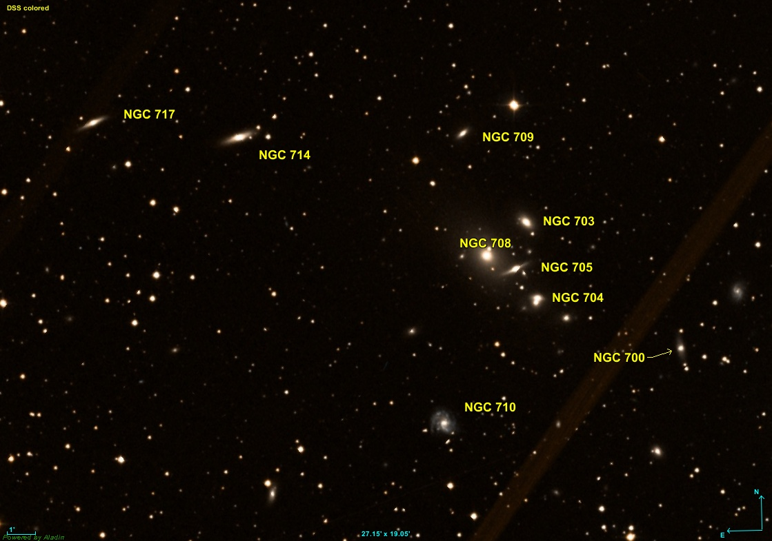 Image créée à l'aide du logiciel Aladin Sky Atlas du Centre de Données astronomiques de Strasbourg et des données de DSS (Digitized Sky Survey).